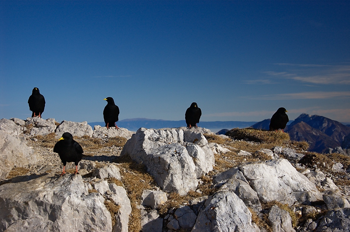 Pyrrhocorax graculus Ti aspettano ....